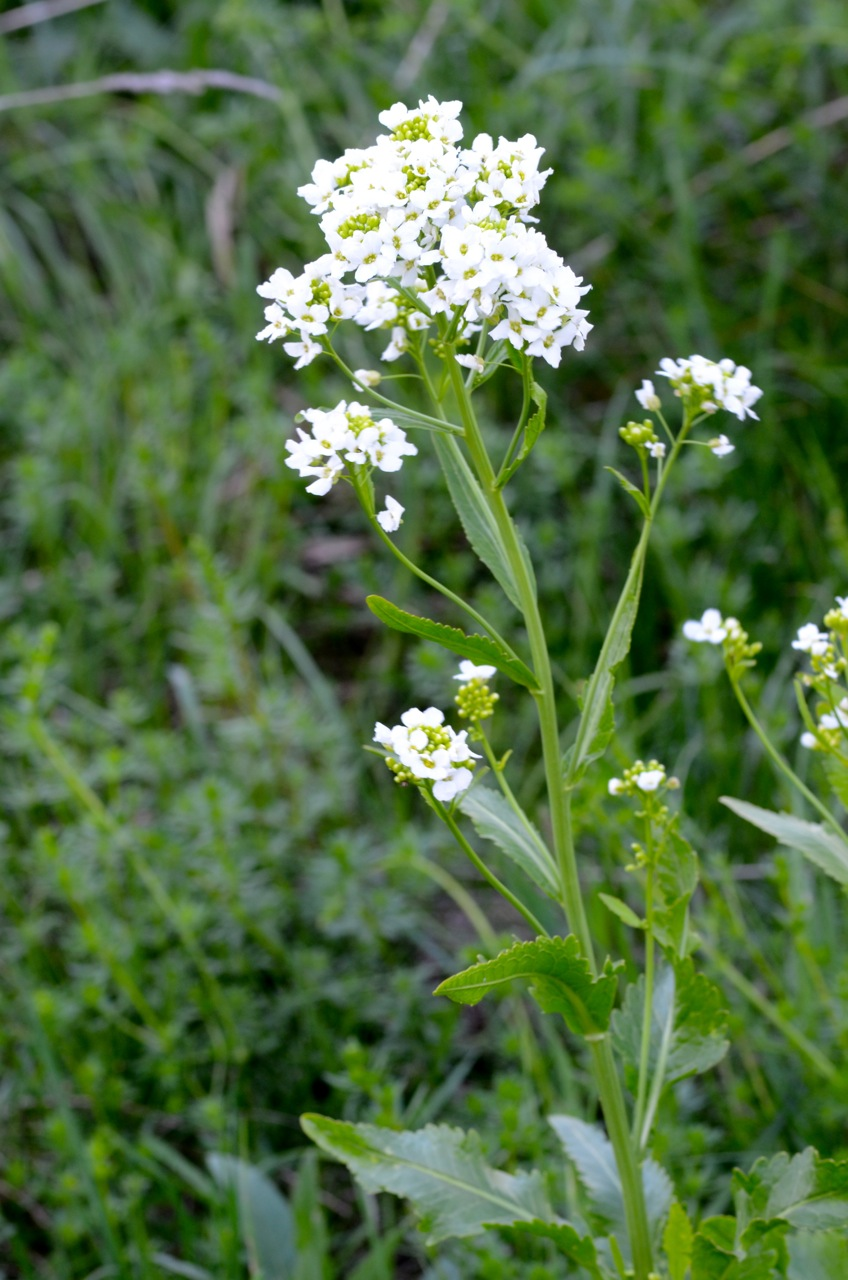 Armoracia rusticana*